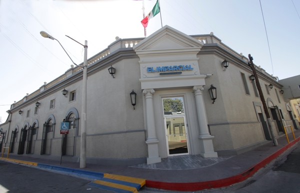 DIARIO EL IMPARCIAL